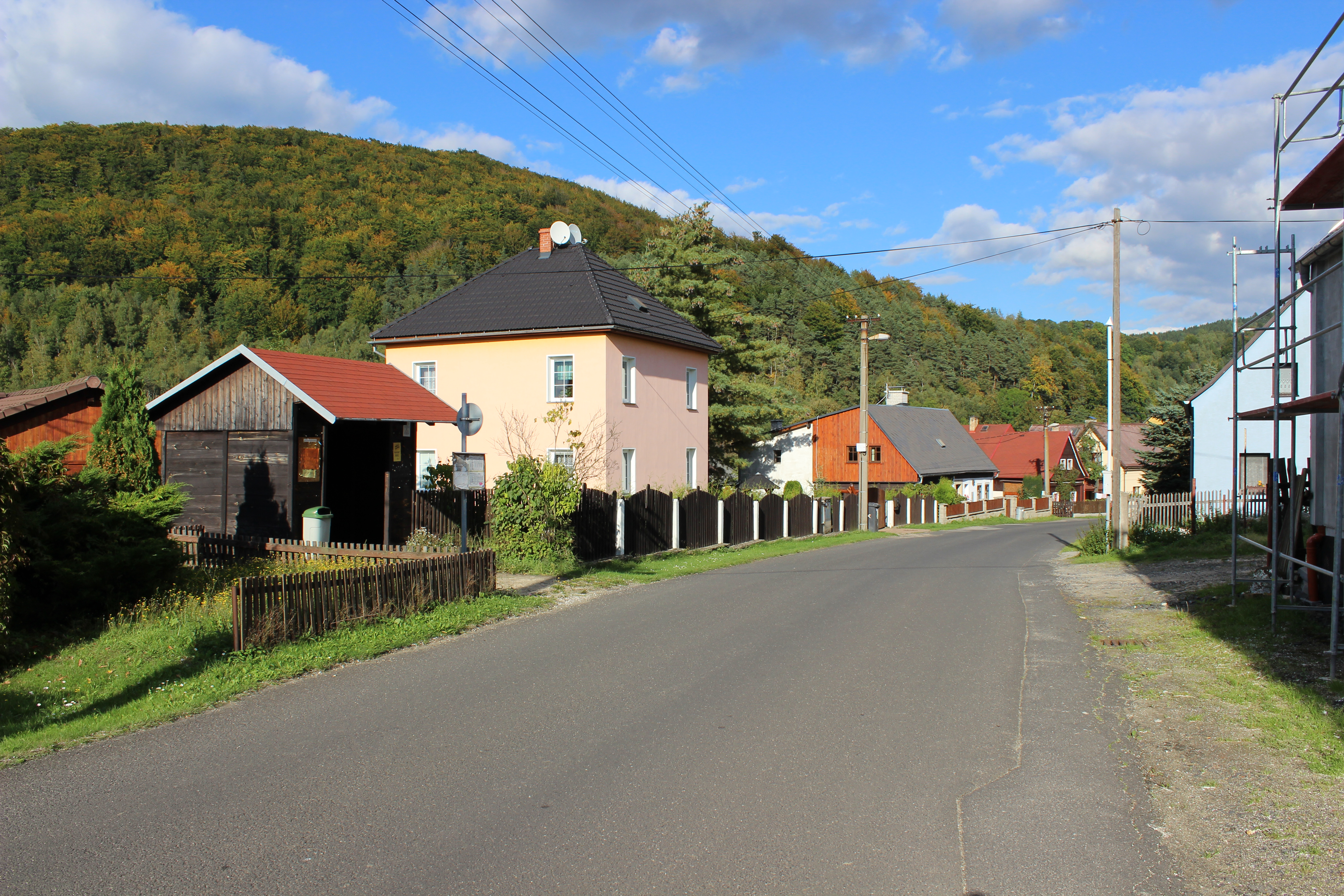 Zástavba ve Vesničce, části Prysku.